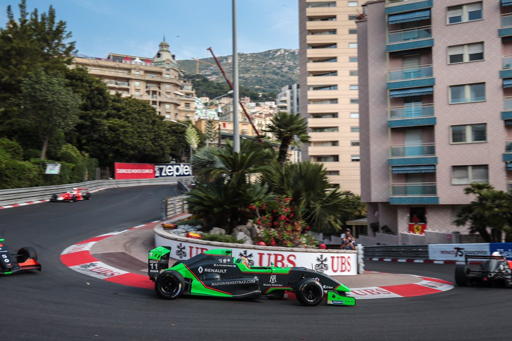 Photographie de Sacha Fenestraz en Eurocup Formula Renault 2.0 en 2017 avec l'équipe Josef Kaufmann Racing à l'épingle du Loews sur le circuit de Monaco.